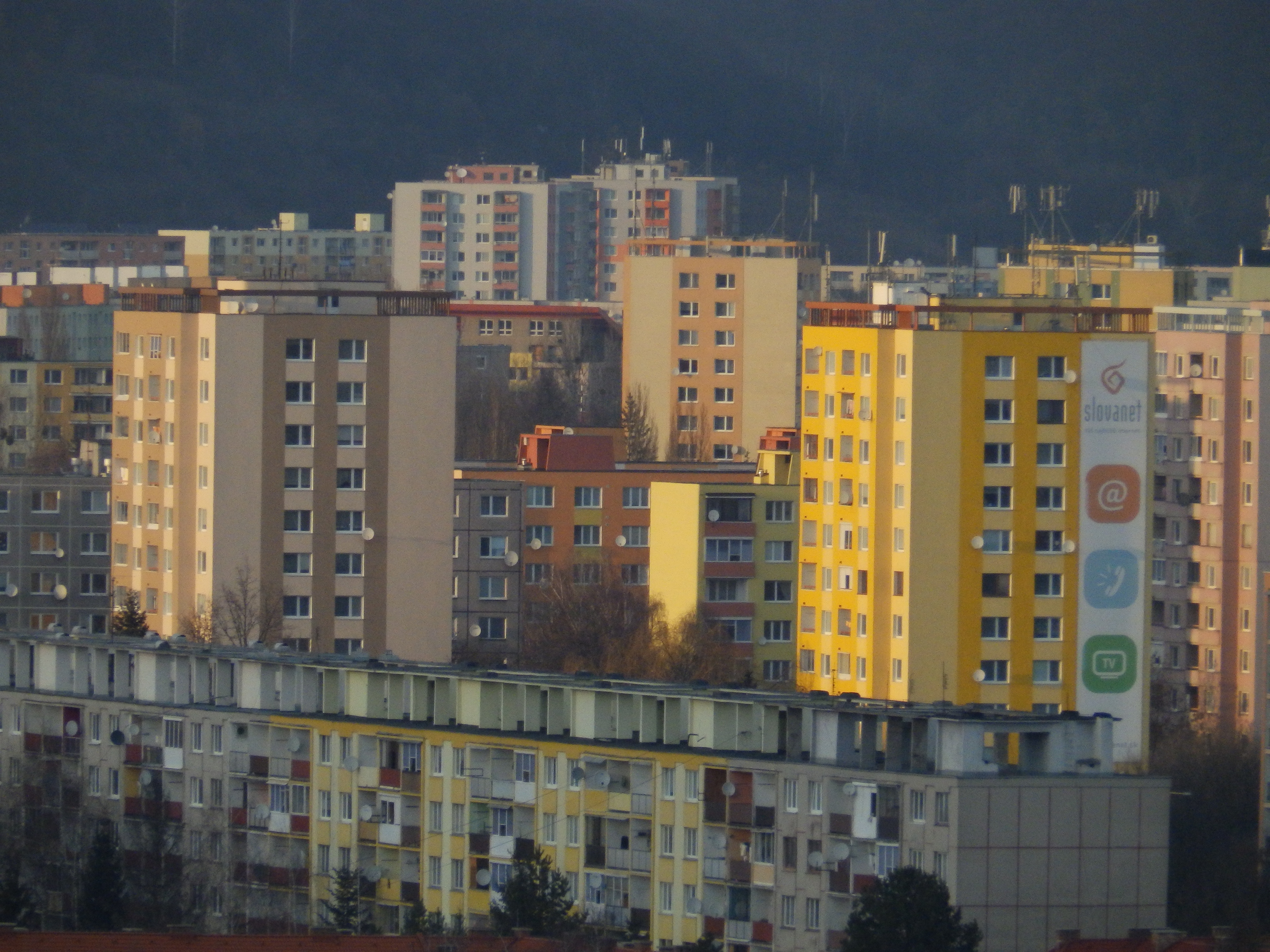 Pohľad z Kalvárie na časť Sídliska III, Prešov